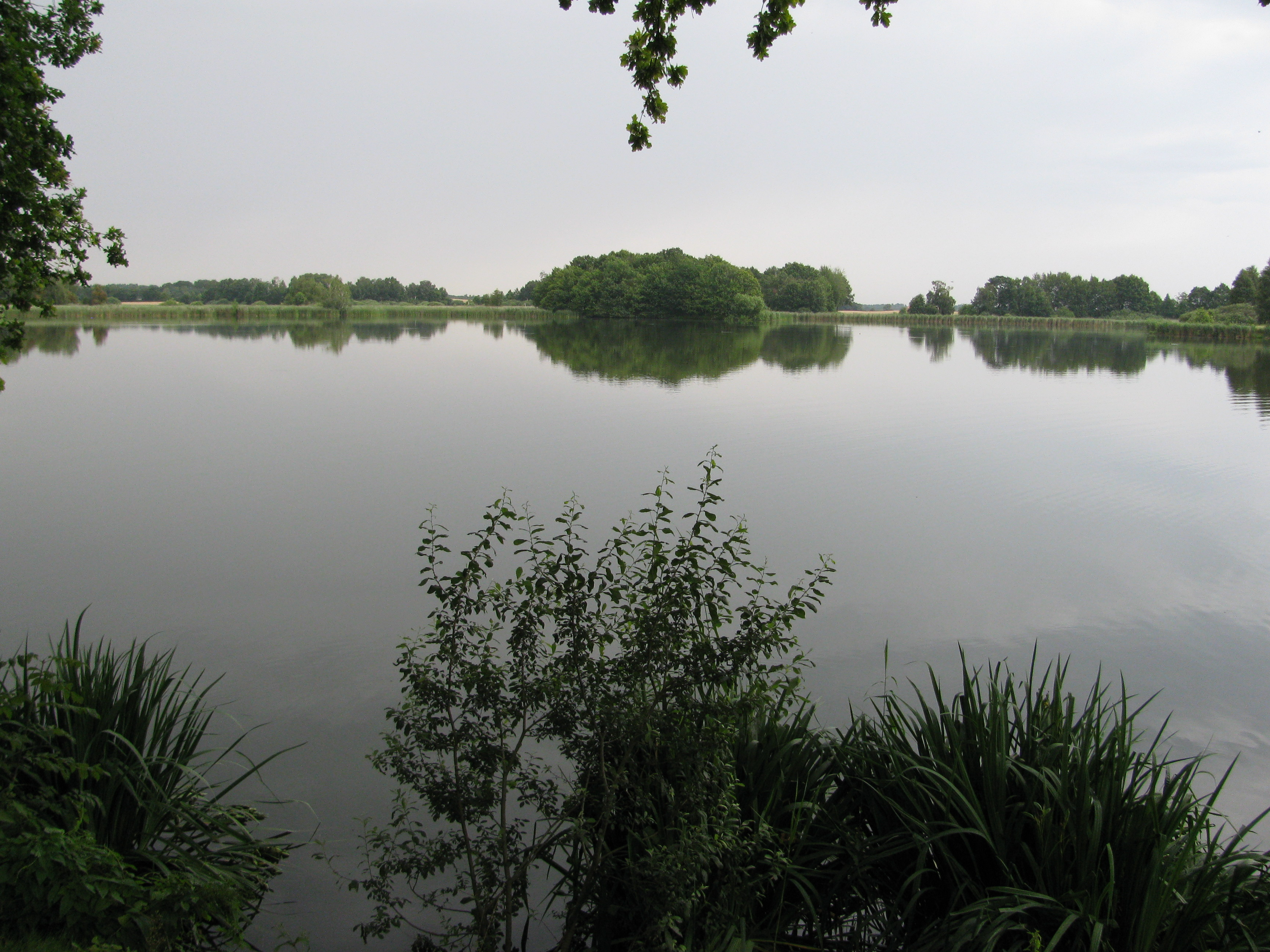 Dippelsdorfer Teich, Dippelsdorf im Ortsteil Friedewald, Gemeinde Moritzburg, Sachsen